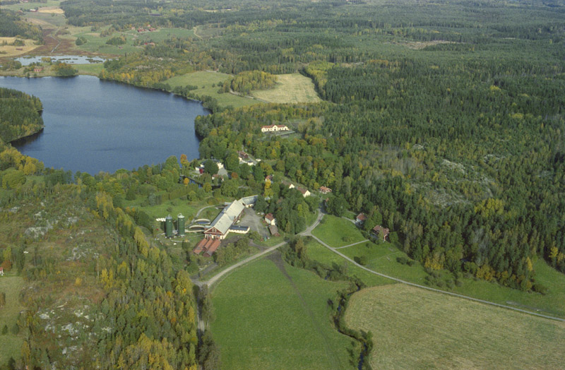 Skeppsta bruk. Bilden är tagen mot (väderstreck): NV Motiv: Skeppsta Nyckelord: Flygbilder, Riksintressen Kategori: Bruksmiljö Skeppsta bruk. Bilden är tagen mot (väderstreck): NV.